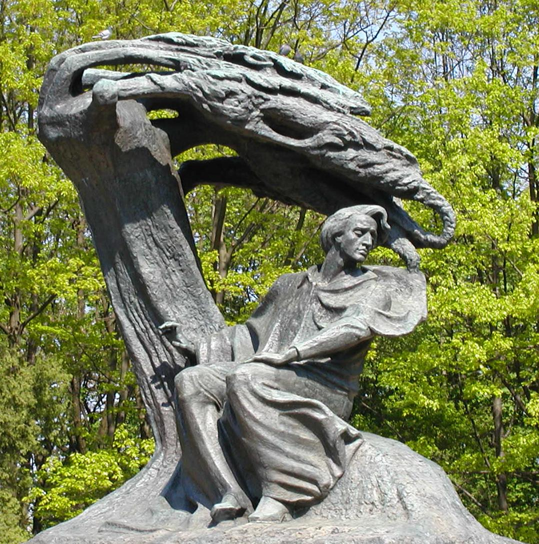 Pomnik Fryderyka Chopina w Łazienkach